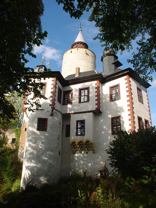 eigenes Foto von 2003, public domain, Burg Posterstein